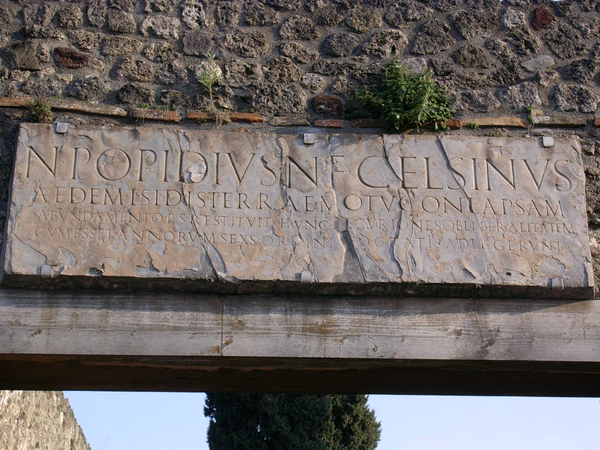 Titulus apposé à l'entrée d'une maison romaine, Pompei.CIL X, 00846 (p 967) = D 06367 = SIRIS 00482 = RICIS-02, 00504/0202 = AE 2000, 00297